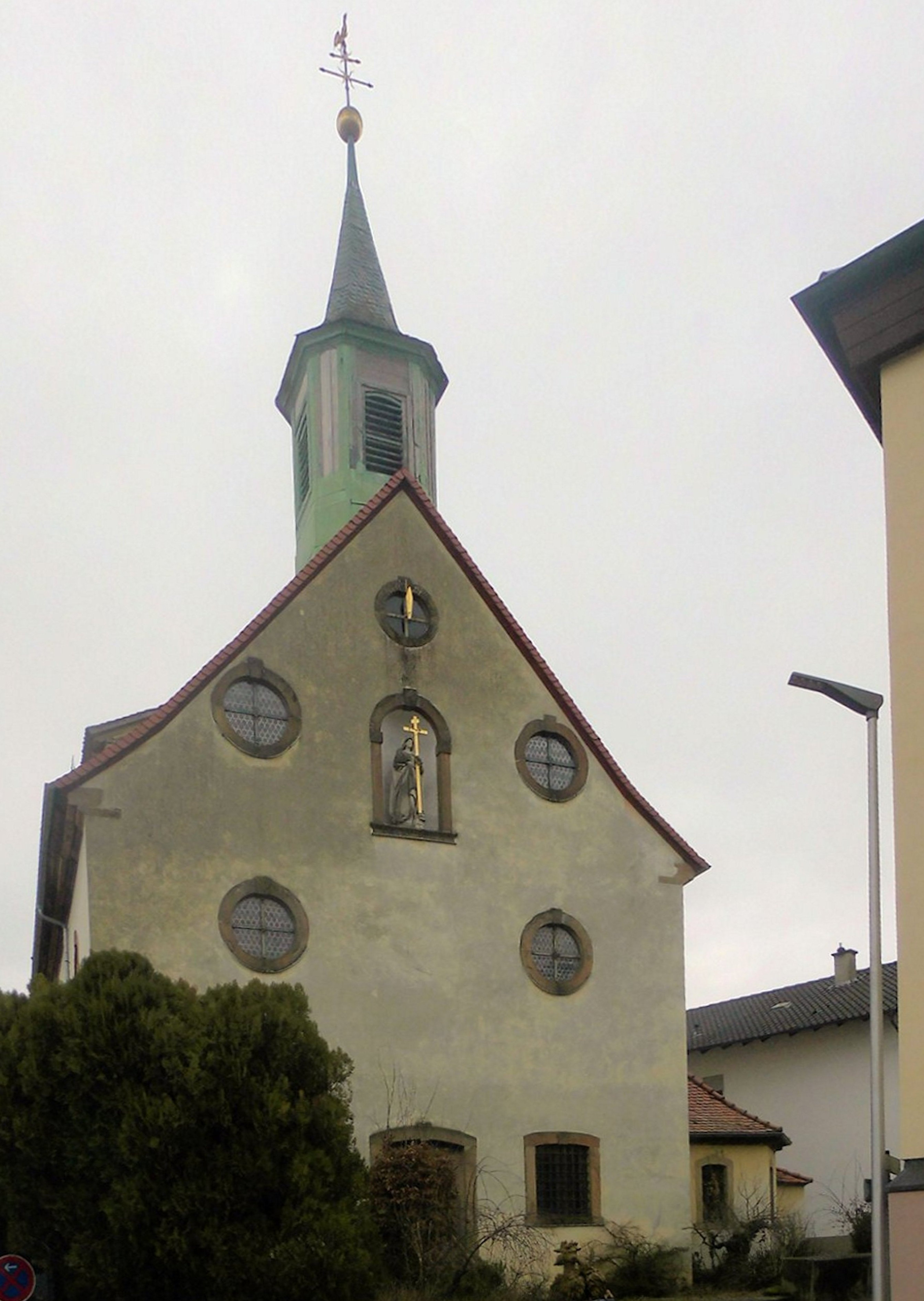 Heiligkreuz-Kirche in Büchig, Stadt Bretten, Landkreis Karlsruhe